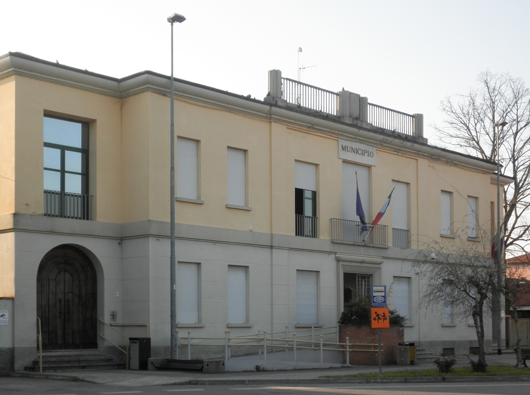 Municipio di Turano Lodigiano.